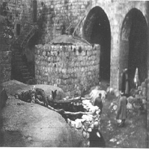 מעזבון קטה בר (Kaete Baer), רעיית אלברט בר. טיול של חניכי בית הספר החקלאי בן שמן במקומות שונים בארץ, 1931. ביקור בכפר הערבי ח'דיתה. בתמונה: החצר של ביתו של השייך